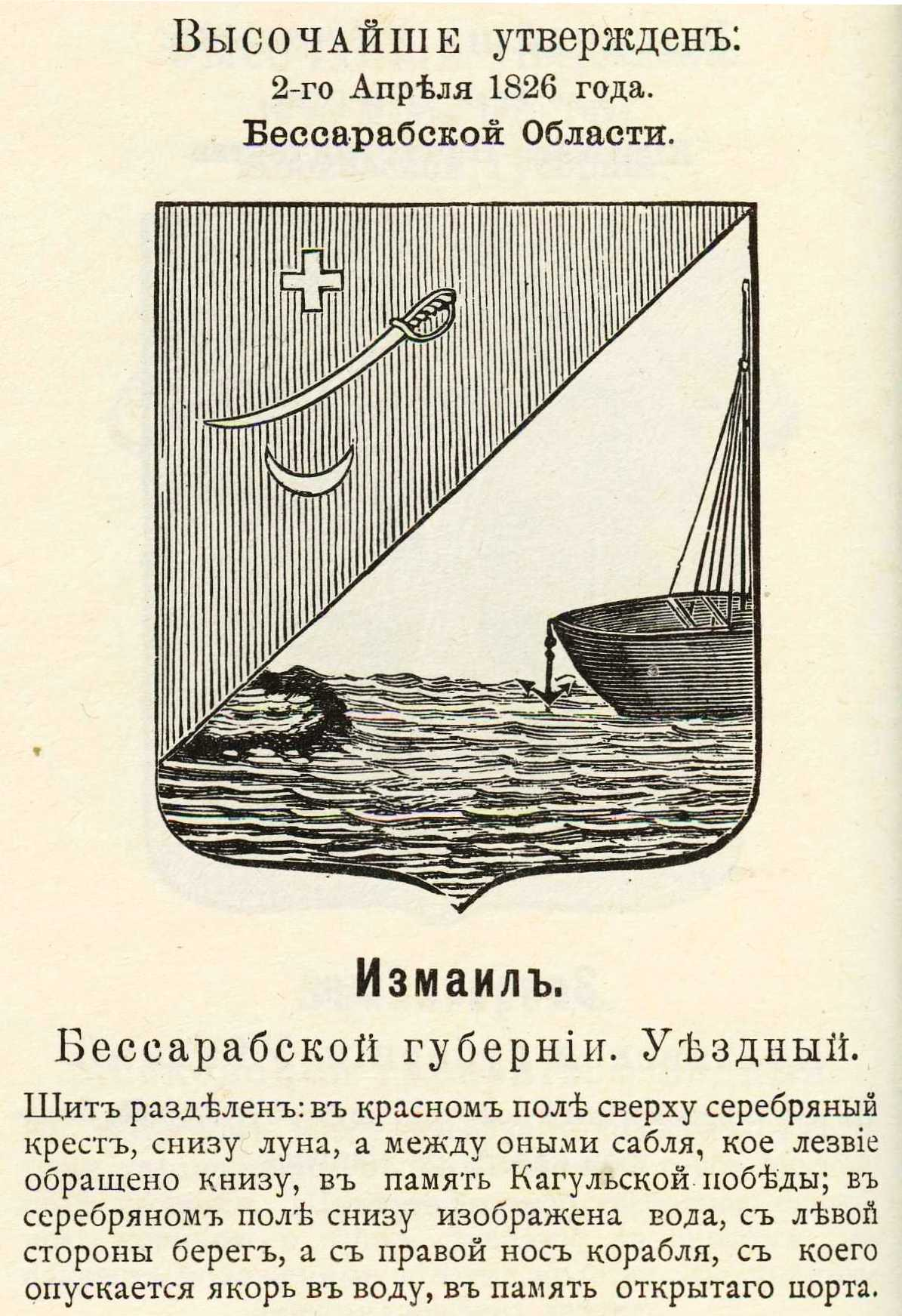 Official Russian Empire Izmail coat of arms. Герб уездного города Измаил Бессарабской губернии Российской Империи с официальным описанием в Гербовнике Павла Петровича Винклера.